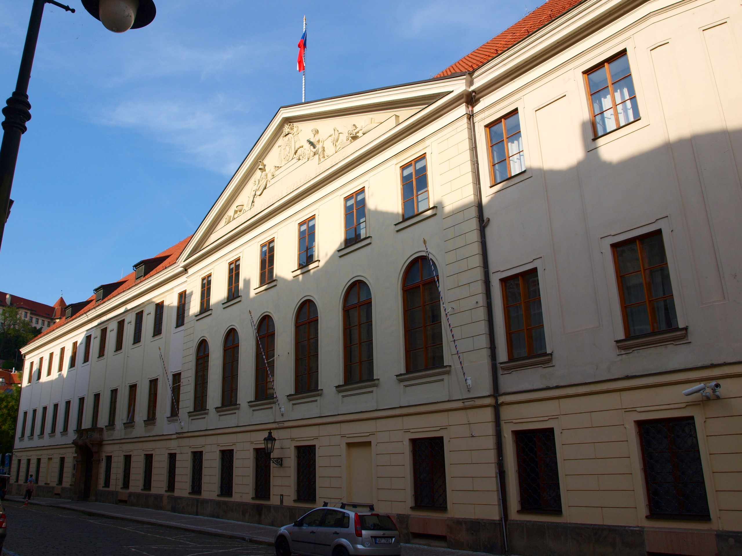 Thunovský palác, Sněmovní